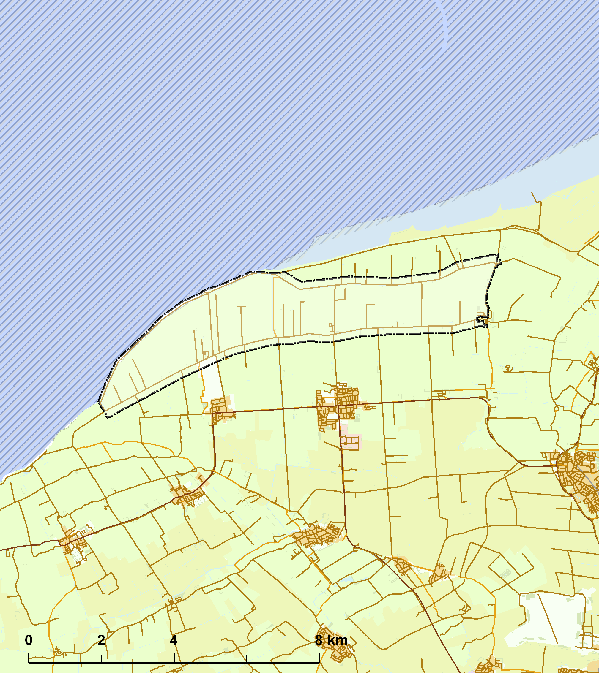 Rijksbeschermd stads- of dorpsgezicht - Oude en Nieuwe Bildtdijken.png